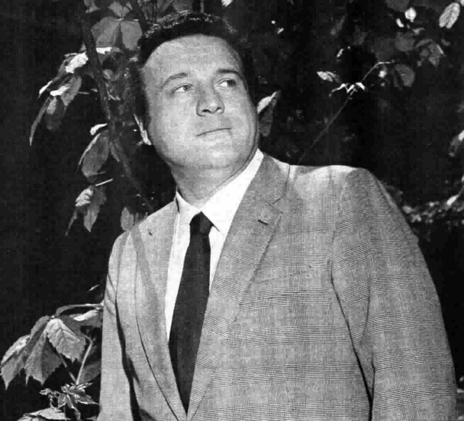 Italian baritone Giangiacomo Guelfi